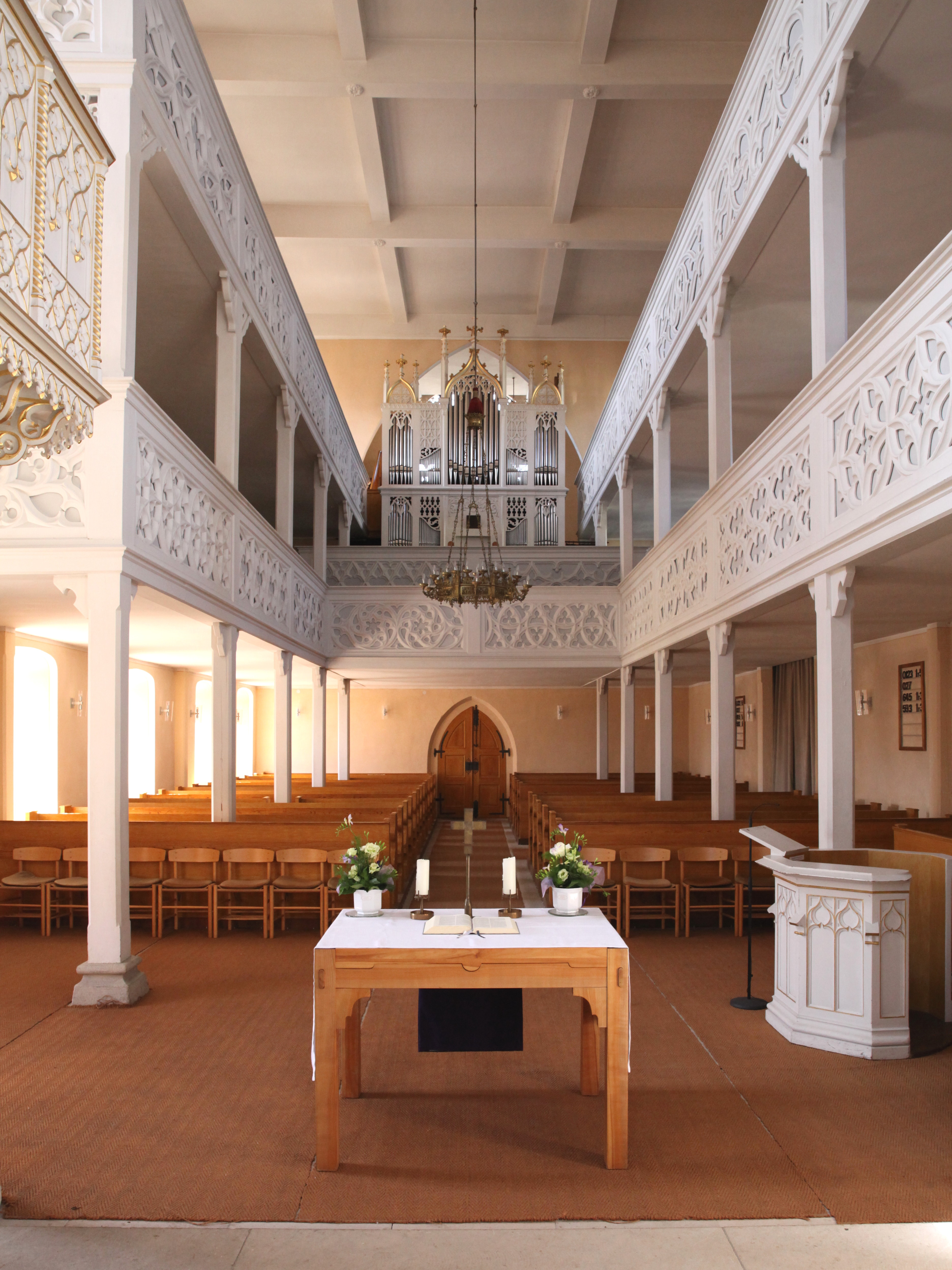 Langhaus, Klosterkirche in Sonnefeld, Landkreis Coburg